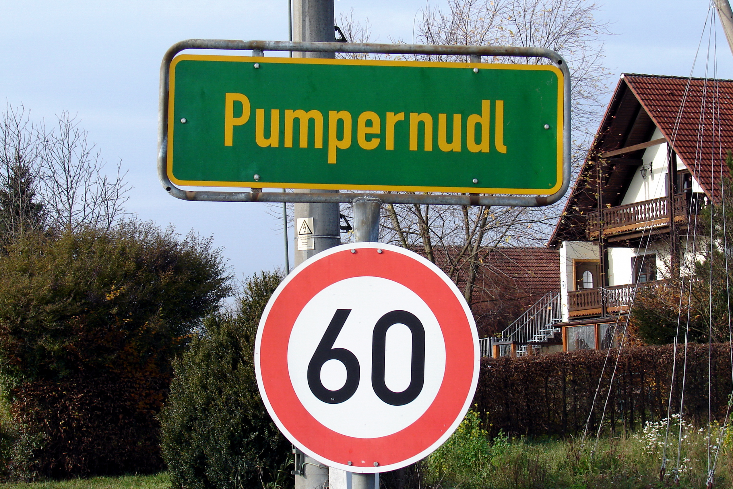 Pumpernudl ist ein Gemeindeteil der oberbayerischen Gemeinde Rudelzhausen im Landkreis Freising. Der landwirtschaftlich geprägte Weiler liegt auf einer Anhöhe in der Region Hallertau. Er hat derzeit 22 Einwohner. Der Ortsname geht auf einen 1491 in einem Pfarrei-Manuskript erwähnten Hans der Pumperlurer zurück.